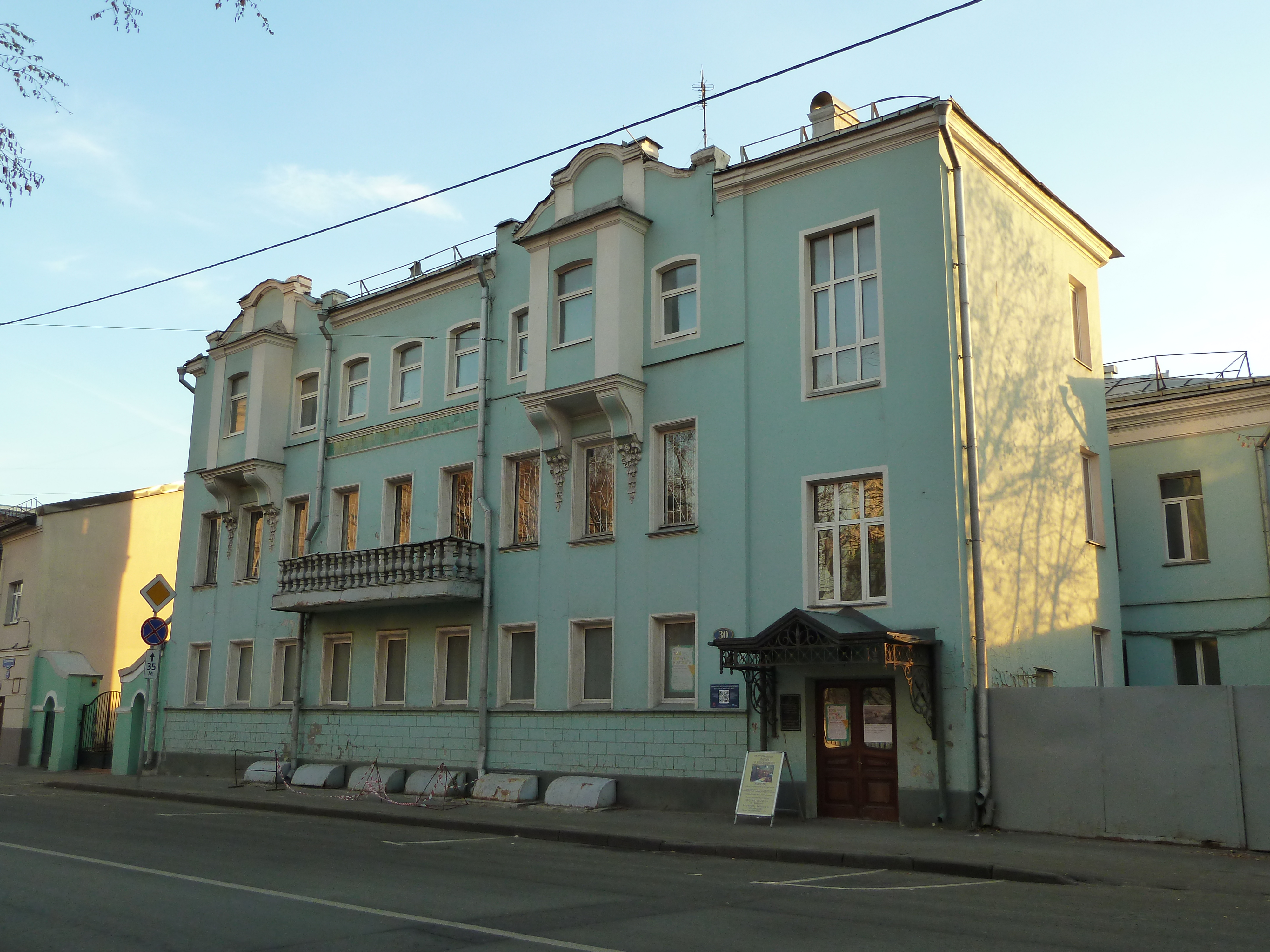 Дом жилой (Москва и Московская область, Москва, Садовническая улица, 30)